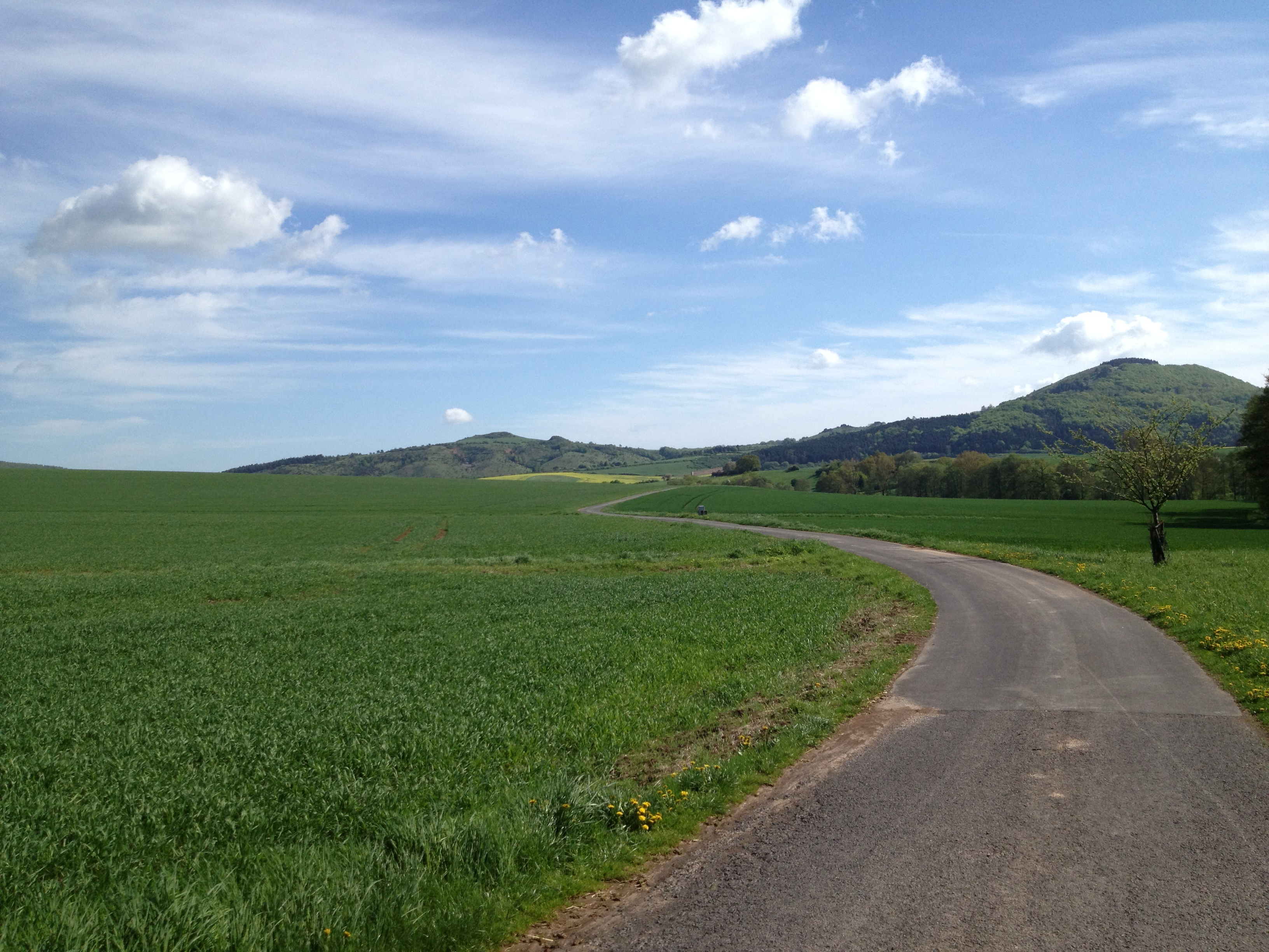 Der Warmetalweg (Hess. Radfernweg R4) zwischen Ehlen und Zierenberg